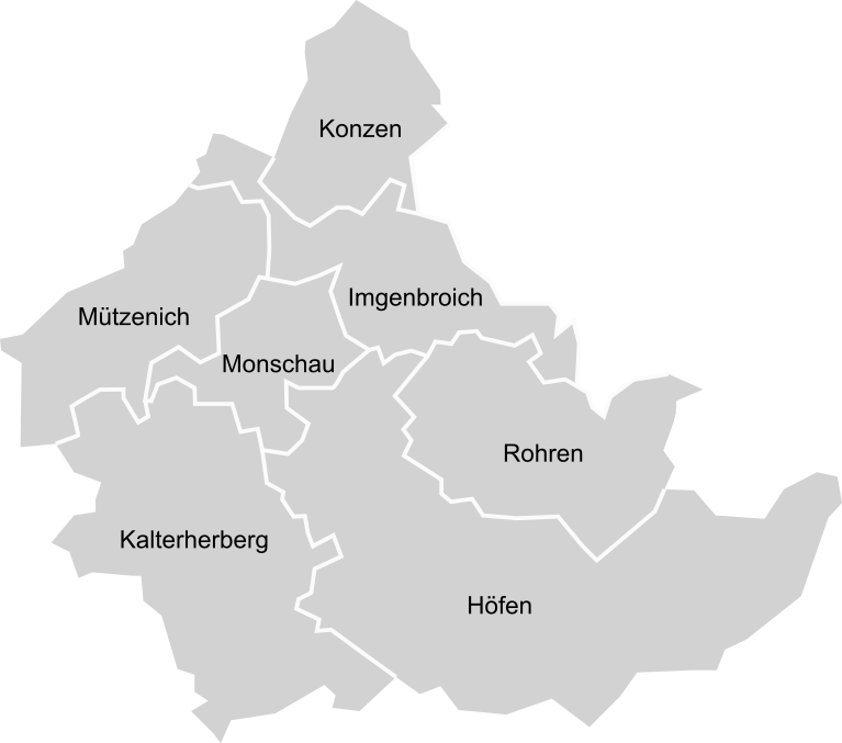 Monschauer Ortsteile